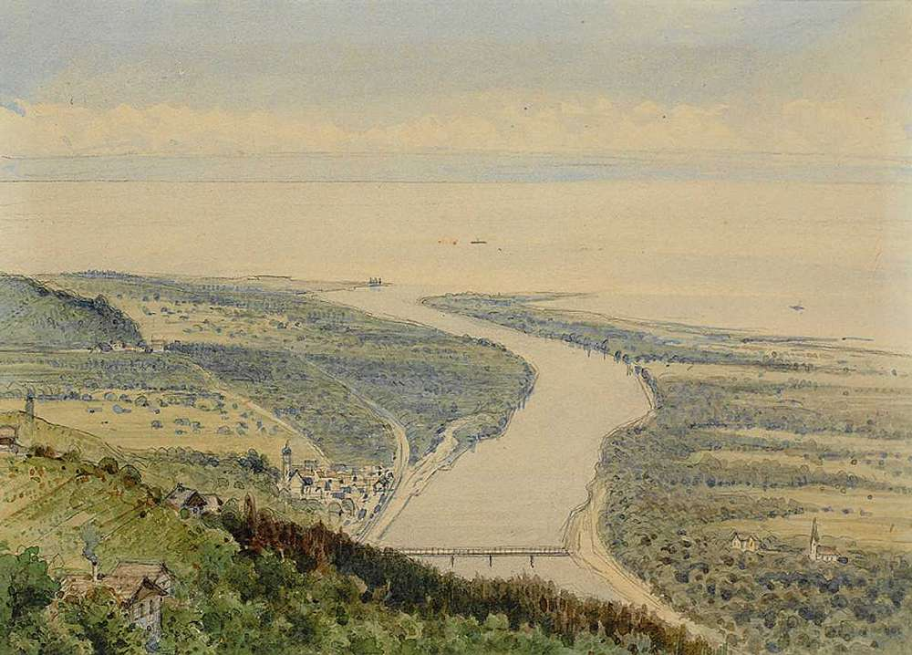 Blick von der Höhe auf die Rheinmündung, Rheineck und den Bodensee, Pencil and watercolours, 19 × 26,5 cm.